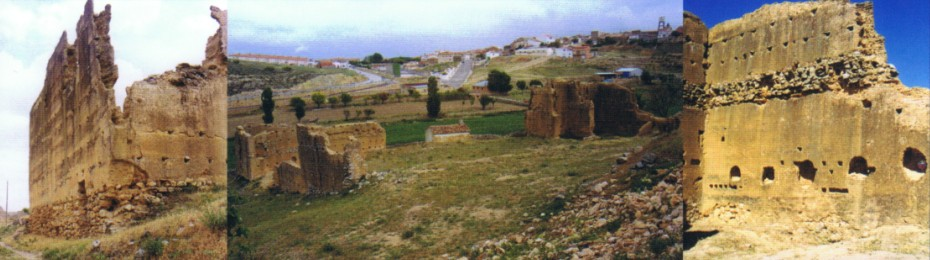 Panoramica de Los Casares de Munera.